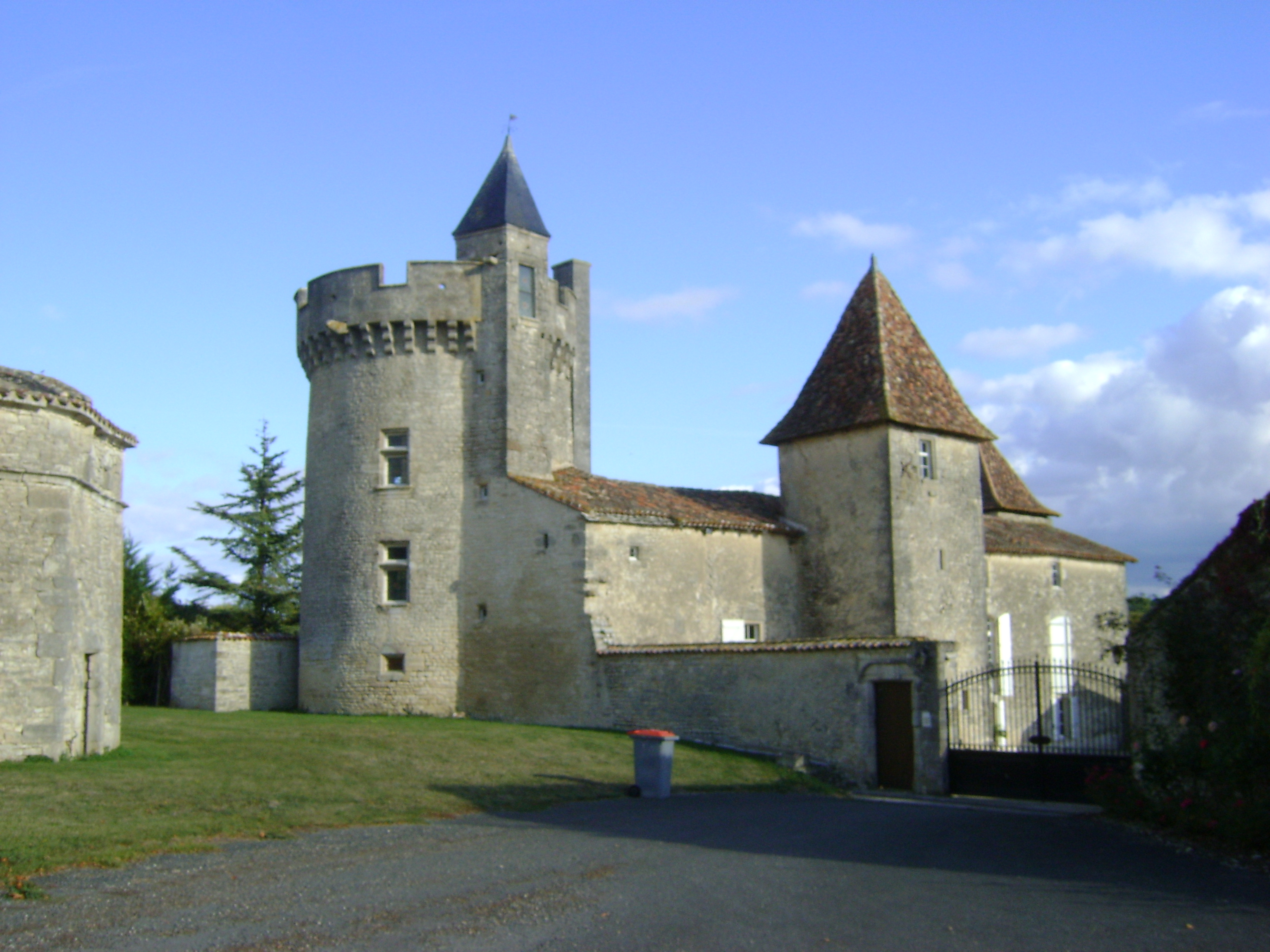 Le Logis de la Barre à Villejoubert, Charente. Vue générale. .